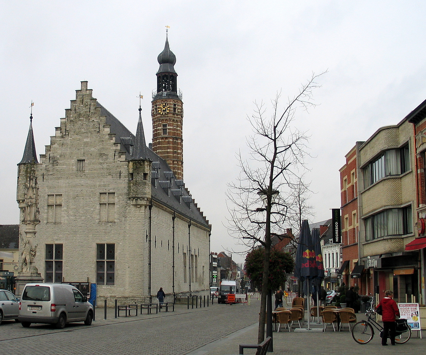 lakenhal en belfort van Herentals, België